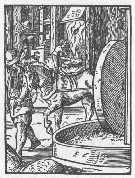 Oil presser